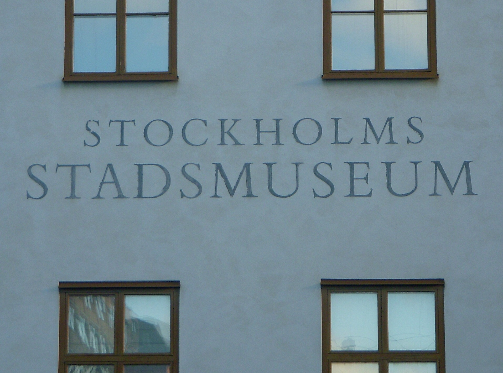 "STOCKHOLMS STADSMUSEUM" (Fasadtext)